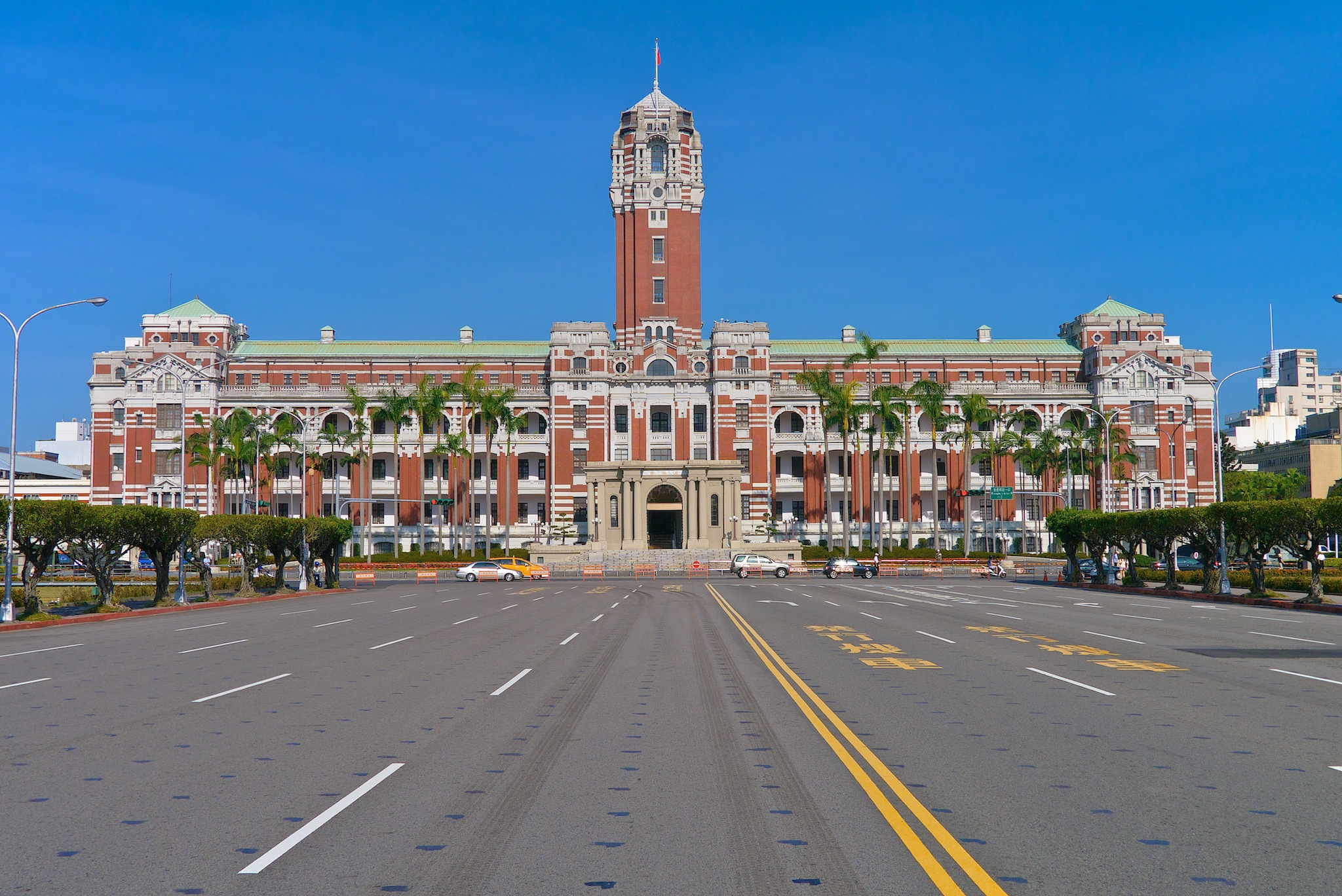 總統府為日治時期的台灣總督府，是當時臺灣最高的行政機構，所在位置原是清末台北城內陳姓及林姓宗祠所在，日人治台後先利用清廷遺留下來的「布政使司衙門」作為臨時總督府，至第五任總督佐久間左馬太開始有興建永久性總督廳舍的打算，這棟建築被日人看作是殖民統治的權力象徵，故設計時特別慎重，1906年採用競圖模式徵選設計圖，不過發生了抄襲又首獎從缺等事件，最後由總督府土木局營繕課自行完成，負責技師則是森山松之助，他亦是競圖落選者之一。興建工程於1912年開工，1915年舉行上樑典禮，至1919年竣工，總面積超過一萬多坪，其規模在當時東亞地區屈指可數。 二次世界大戰後期，總督府因在殖民地的角色重要，成了美軍轟炸的目標，造成建物嚴重的損傷，除中央塔右側的衛塔、東南側局部辦公室被炸毀，並遭到三天的祝融肆虐。1948年底大修完成，並配合慶祝蔣中正總統六十大壽，改稱為「介壽館」。1949年國民政府遷台後，則作為總統府使用，繼續維持其權力核心的角色。 這座龐大而壯麗的建築，見證了近百年的臺灣歷史，不但成為臺北市的重要地標，也是近現代史之化身。